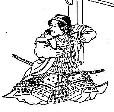 松本奎堂